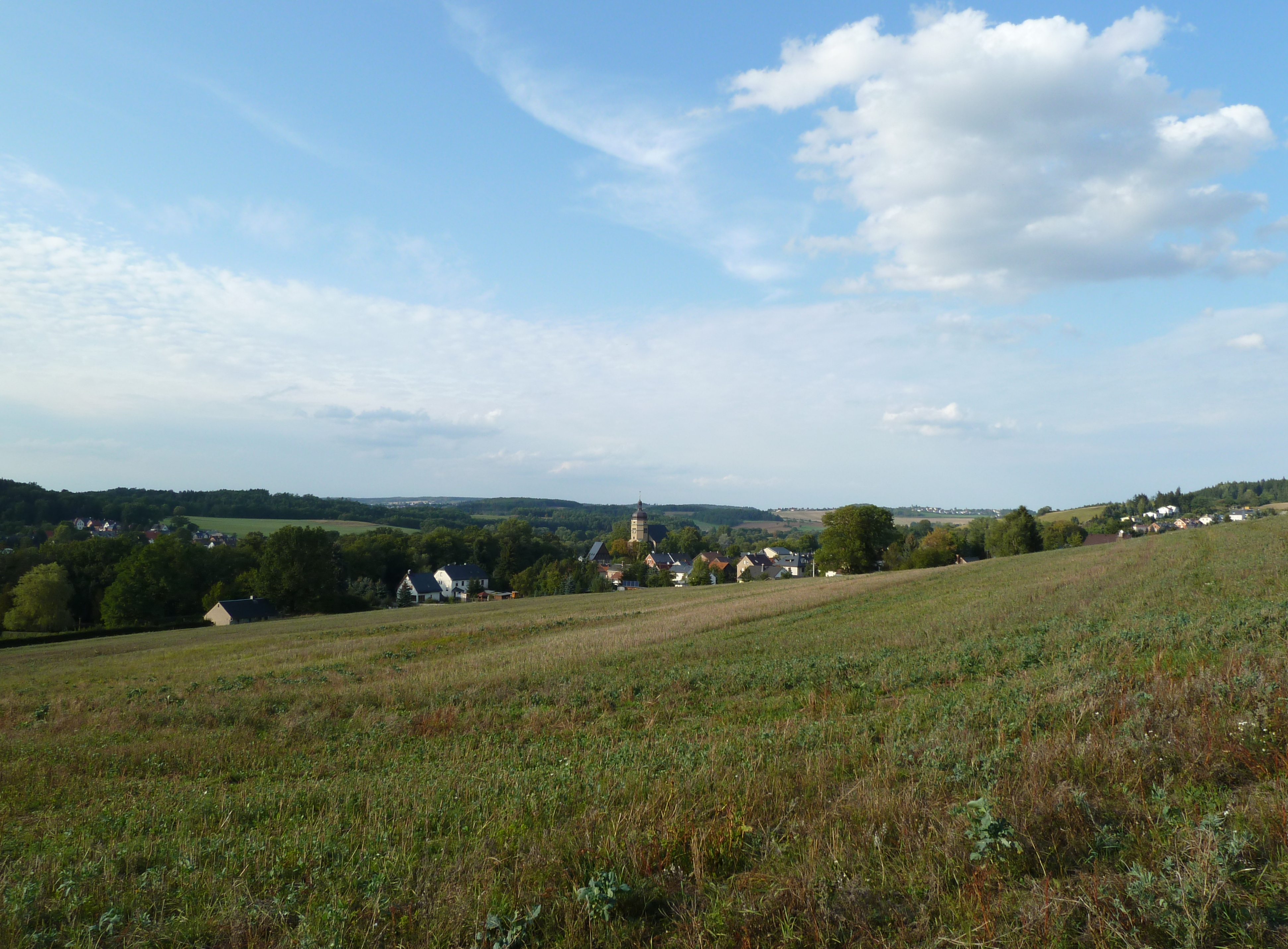 Die Kirche und das Herrenhaus des Rittergutes dominieren die Ansicht des Ortes schon von weitem.